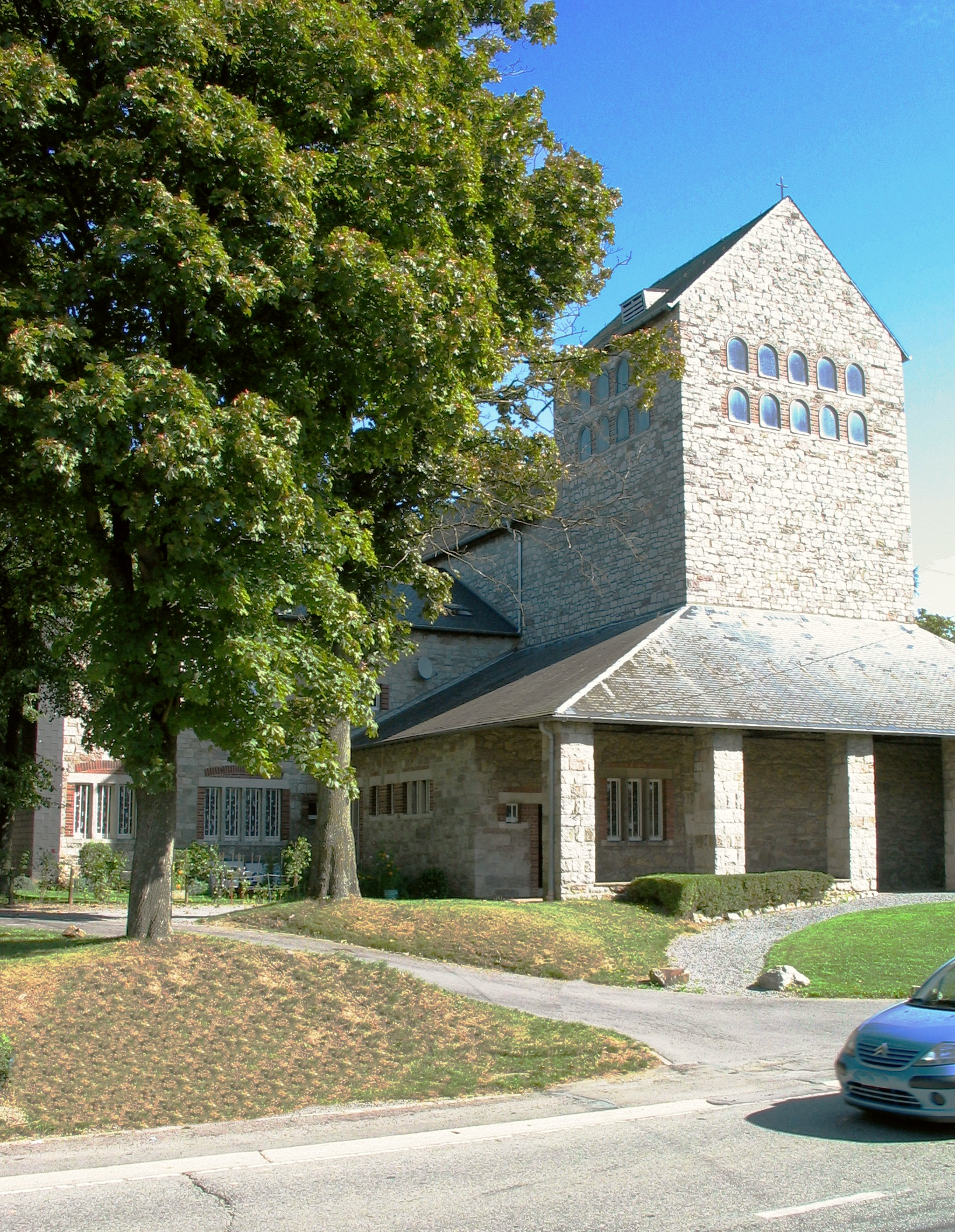 Kloster Garnstock, Kirchenbau des Architekten Domenikus Böhm, eingeweiht 1934